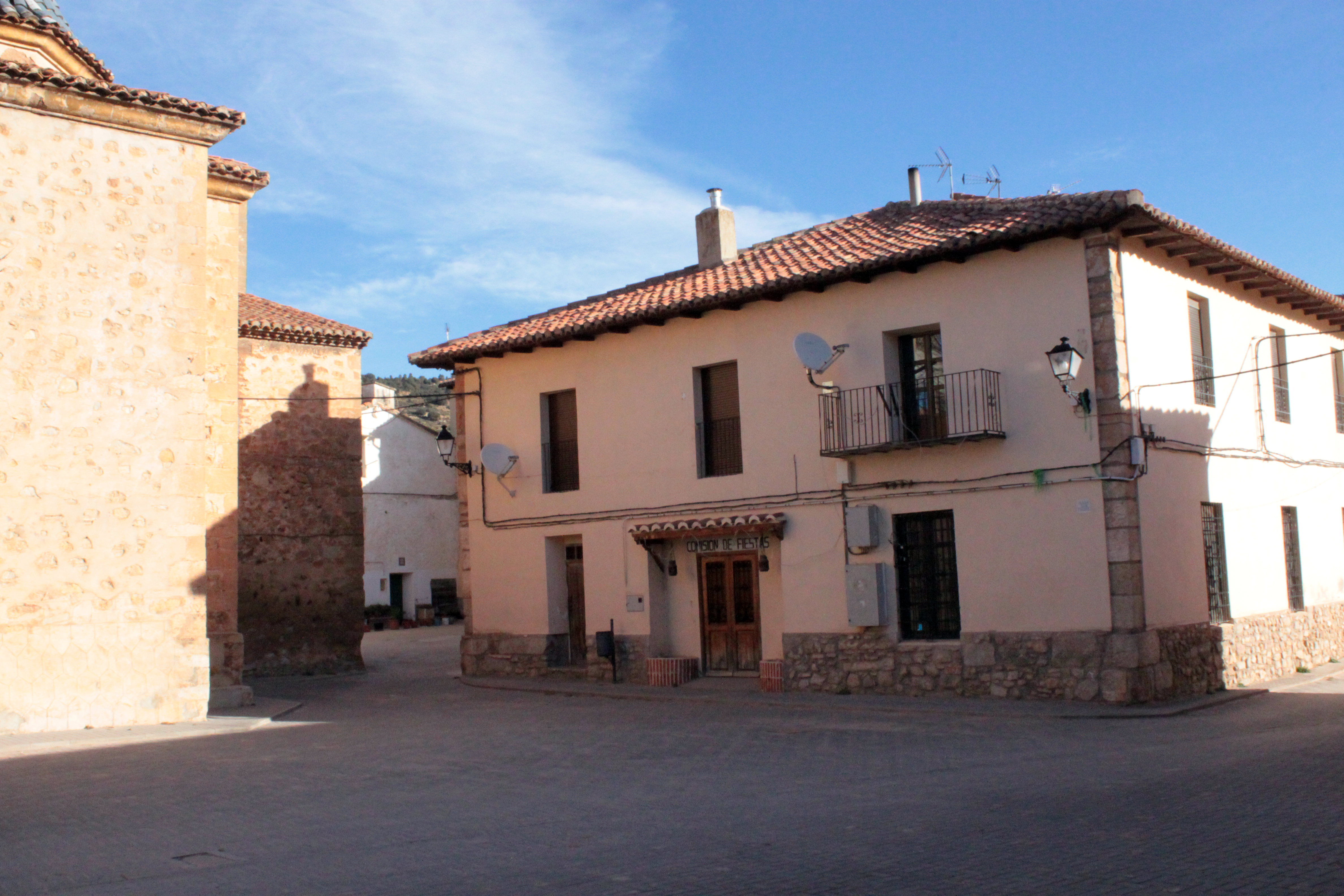 Vista del Ayuntamiento de Puebla de San Miguel en la plaza de San Miguel. Puebla de San Miguel, provincia de Valencia, Comunidad valenciana, España.